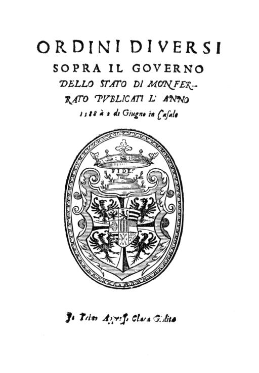 Frontespizio 2